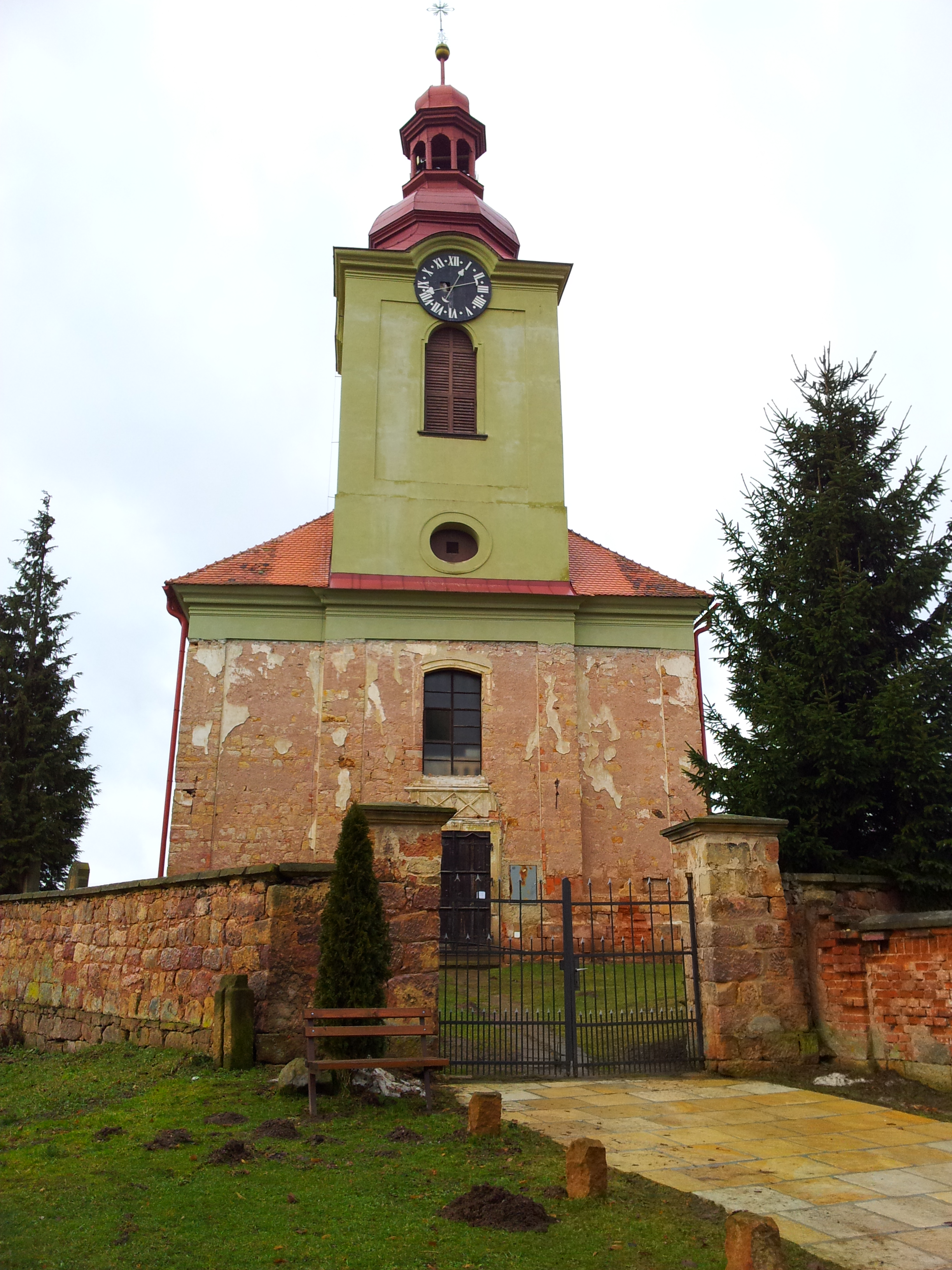 Kostel sv. Maří Magdaleny (Lužany), Lužany 1